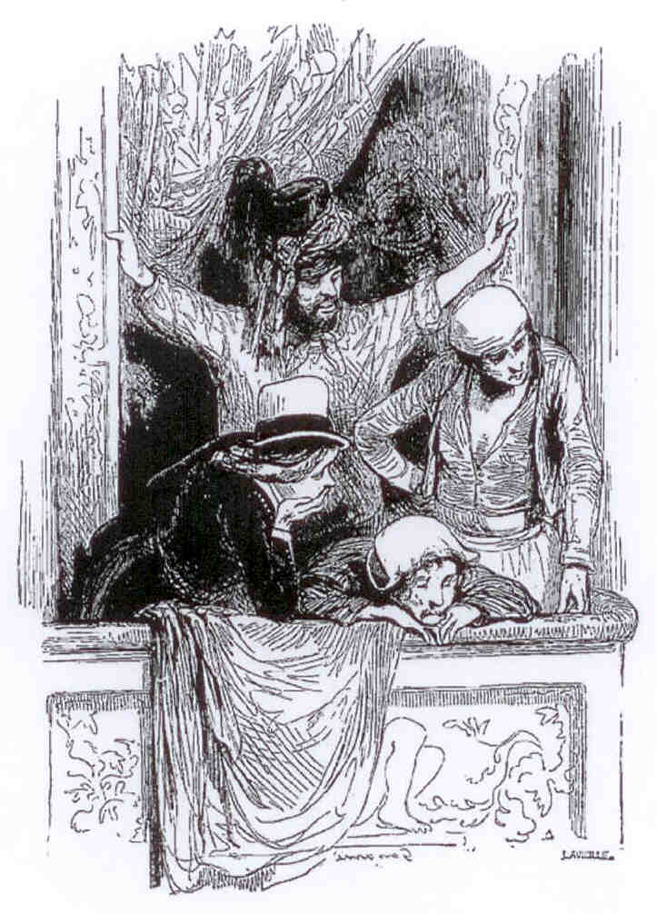 La loge à l'Opéra au moment du Carnaval de Paris.